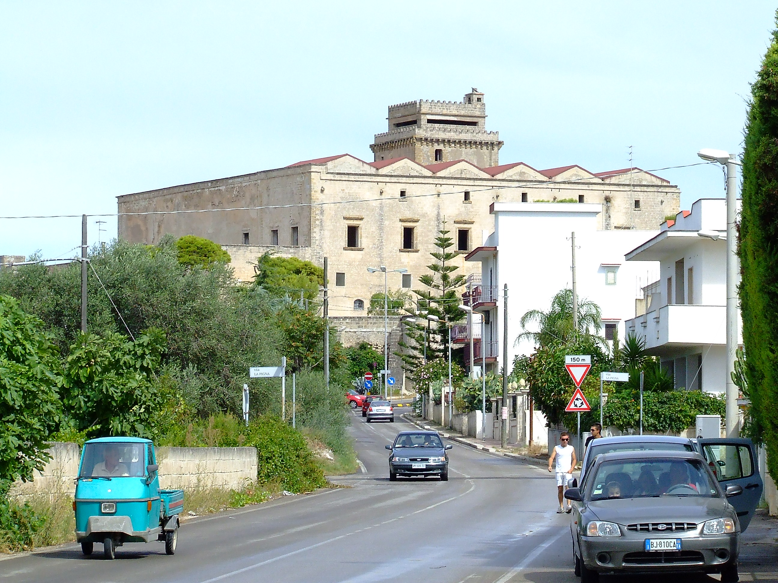 Veduta del paese di Leporano con il palazzo dei Principi Muscettola (Taranto - Italy)